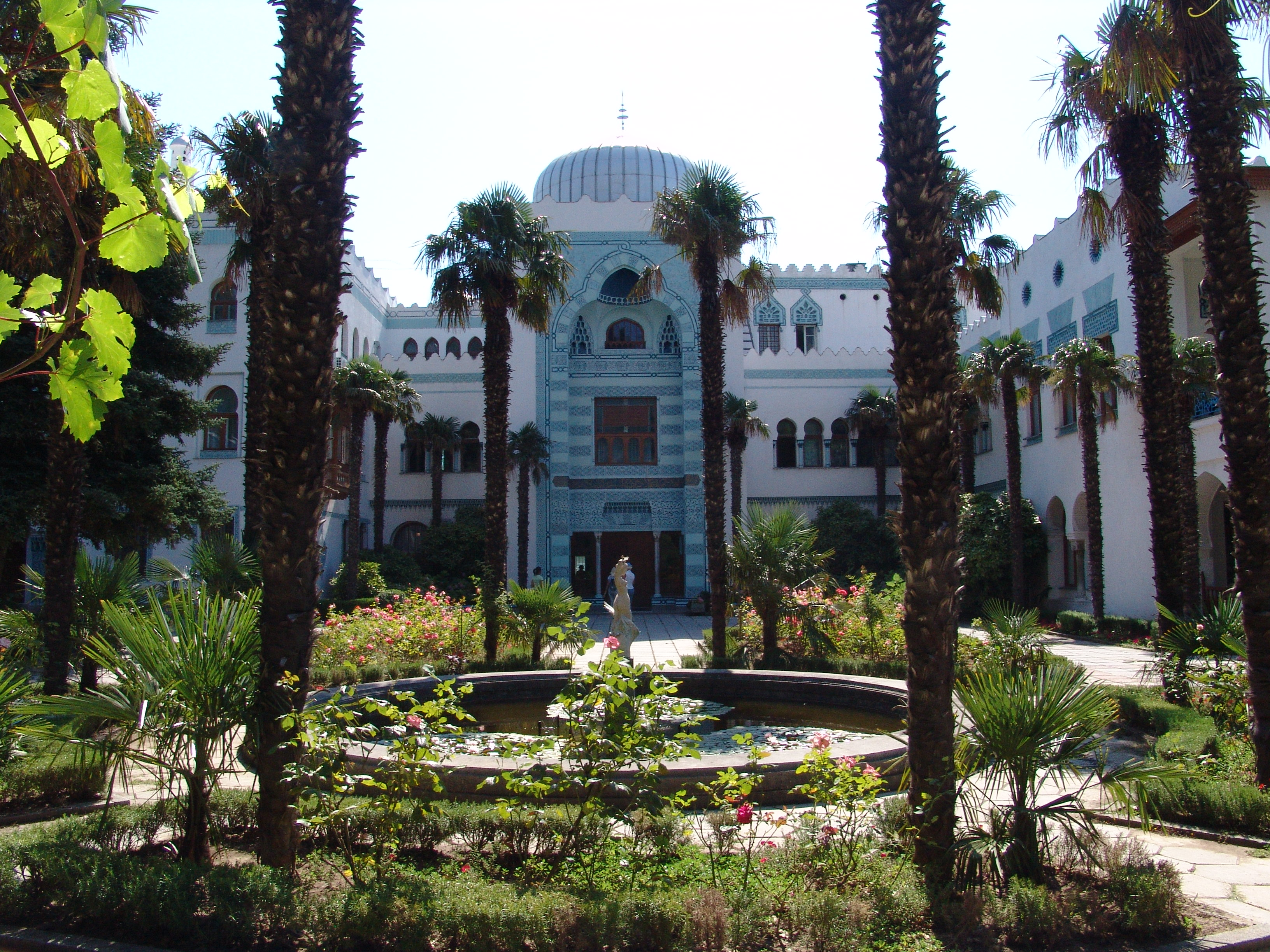 Дворец Дюльбер. Главныйкорпус